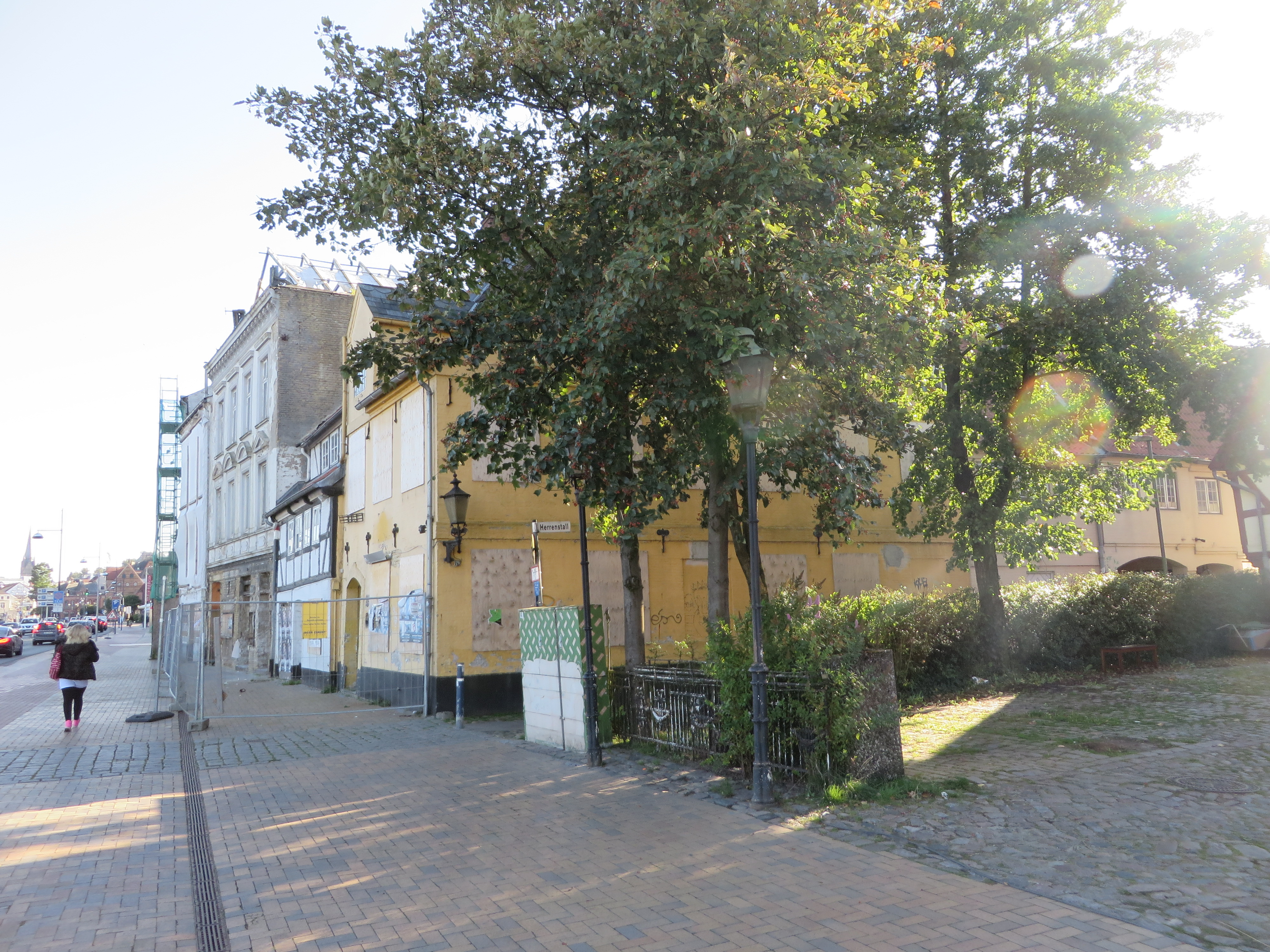 Herrenstall von der Seite mit Blick Richtung Eckhaus Schiffbrücke 36 (Flensburg 2014)